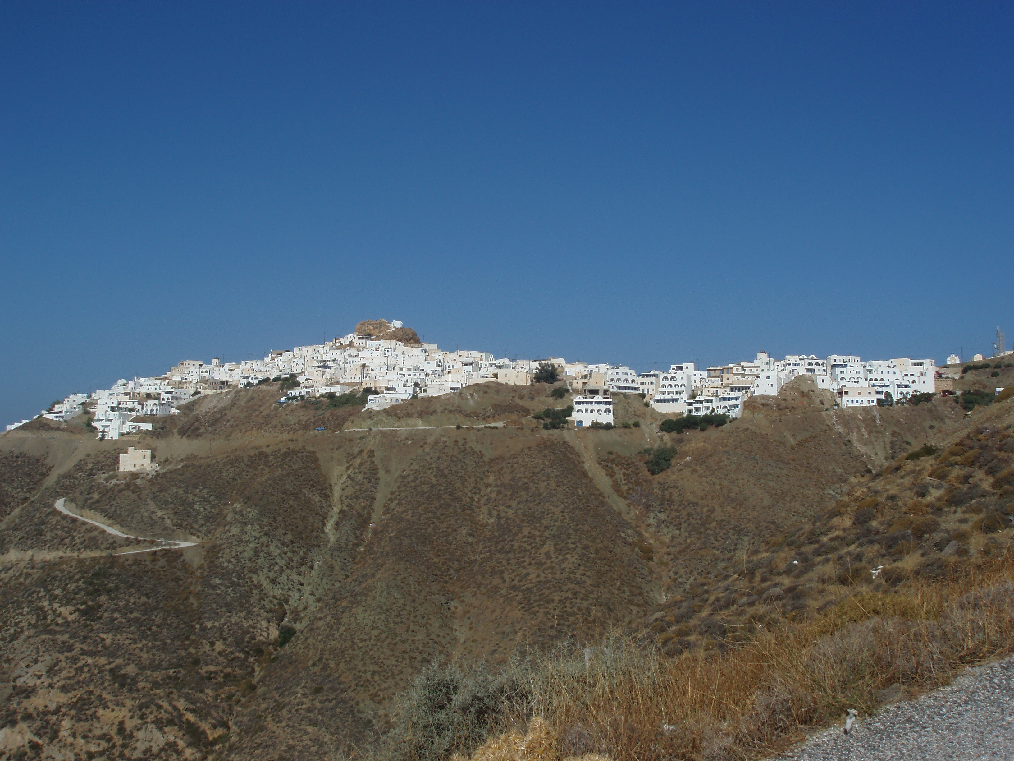 Chora von Anafi, Kykladen, Griechenland